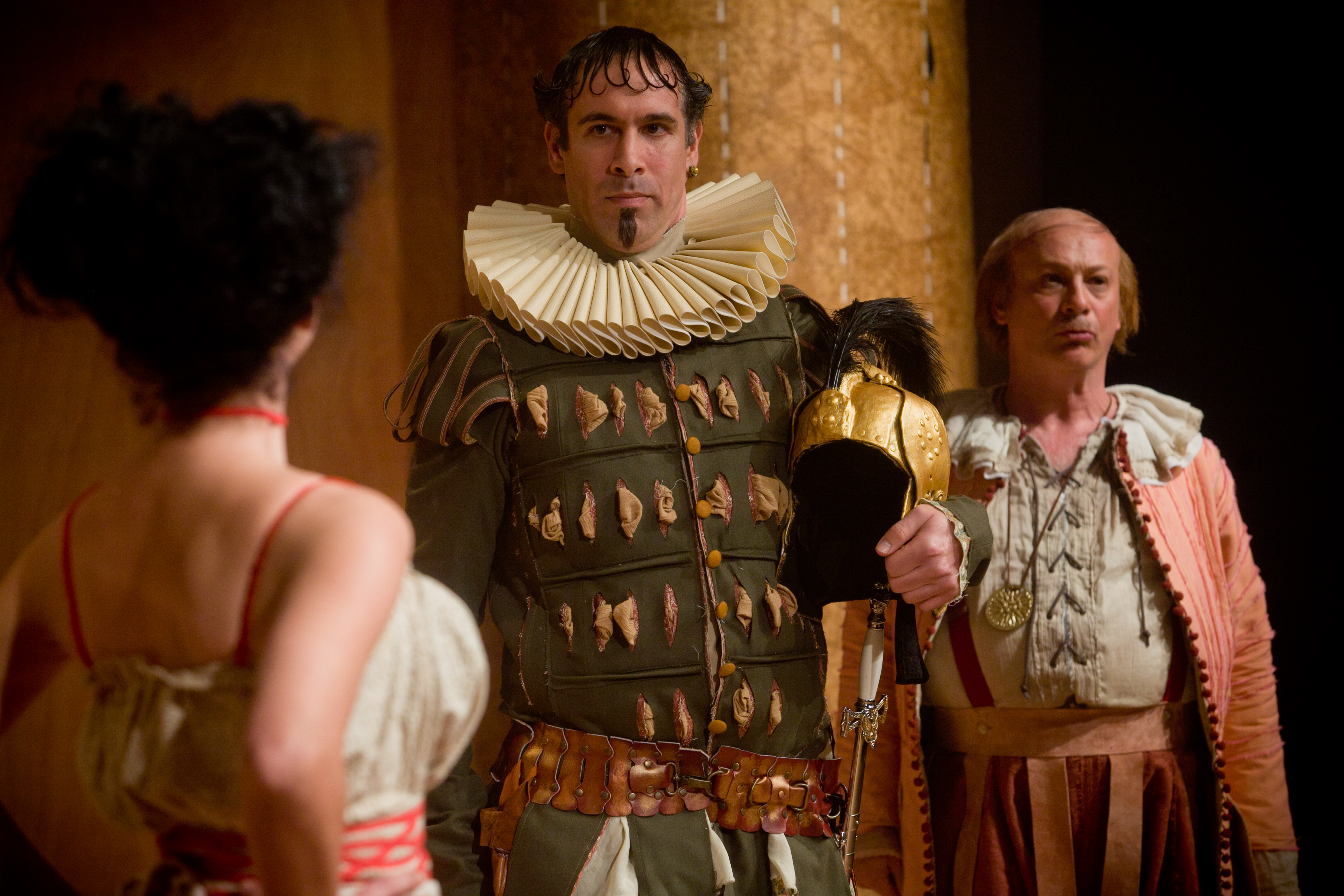 הלילה השנים עשר, תיאטרון החאן